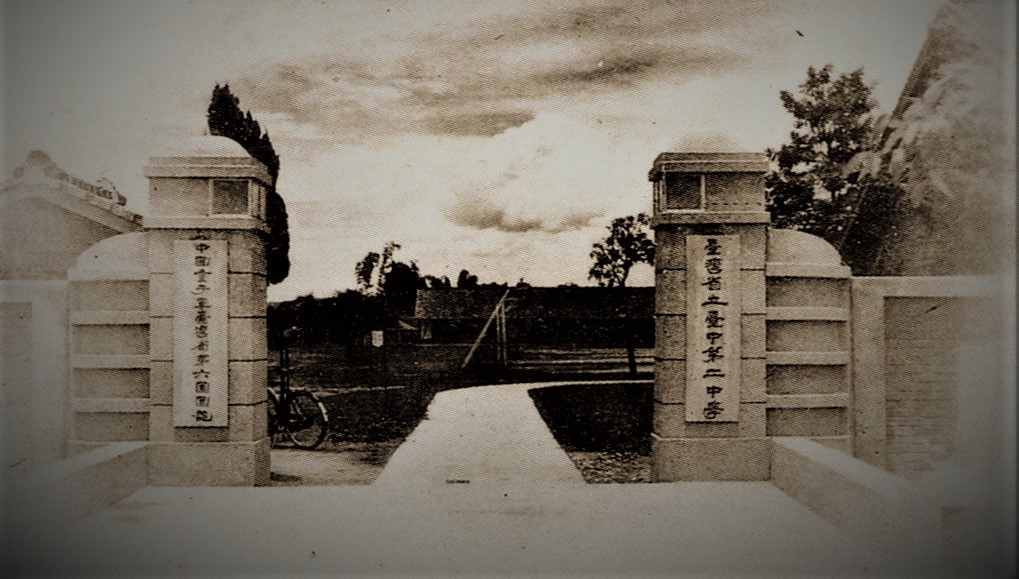 中文（台灣）: 台中二中史料